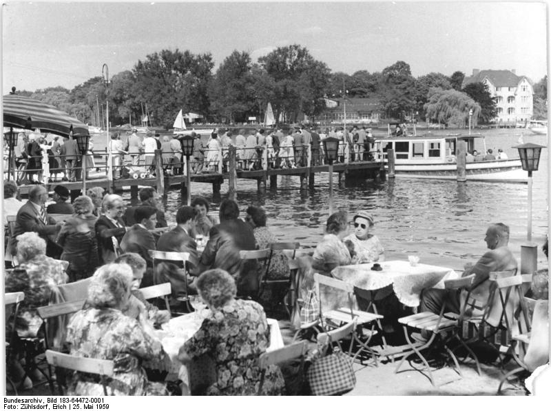 Berlin, Gesellschaftshaus Grünau, Anlegestelle, Ausflugsschiff Zentralbild Zühlsdorf RS-Noa 25.5.1959 Vor den Toren Berlins herrschte bei blauem Himmel und Sonnenschein auch am Sonntag, dem 24.5.1959, reges Treiben. Vom Gesellschaftshaus in Berlin-Grünau fuhren viele Berliner mit der Fähre nach Schmetterlingshorst.